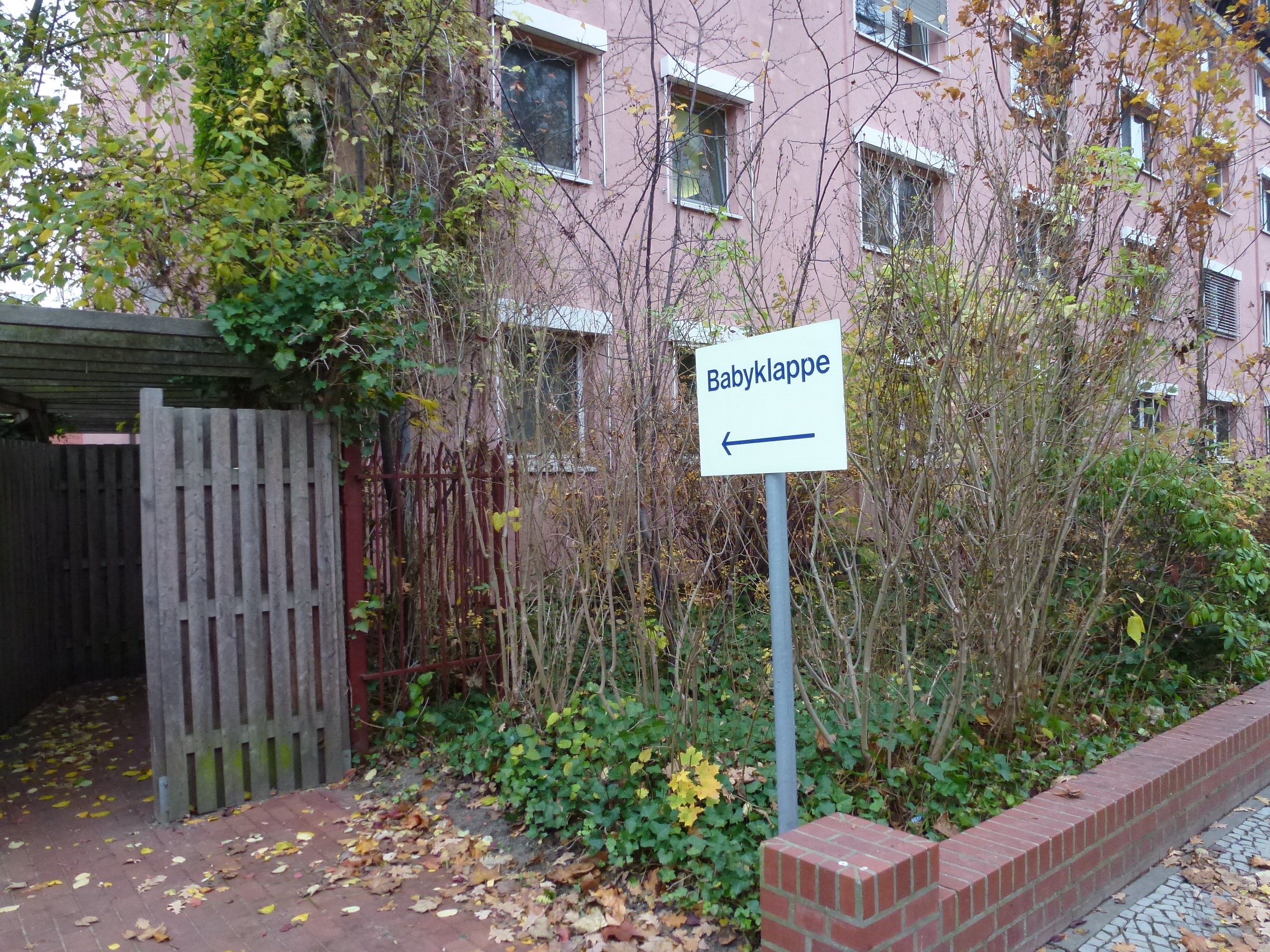 Babyklappe im St. Joseph-Krankenhaus Berlin-Tempelhof